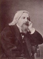 Imrich Henszlmann (1813 - 1888), Architekt a člen uherské akademie věd.